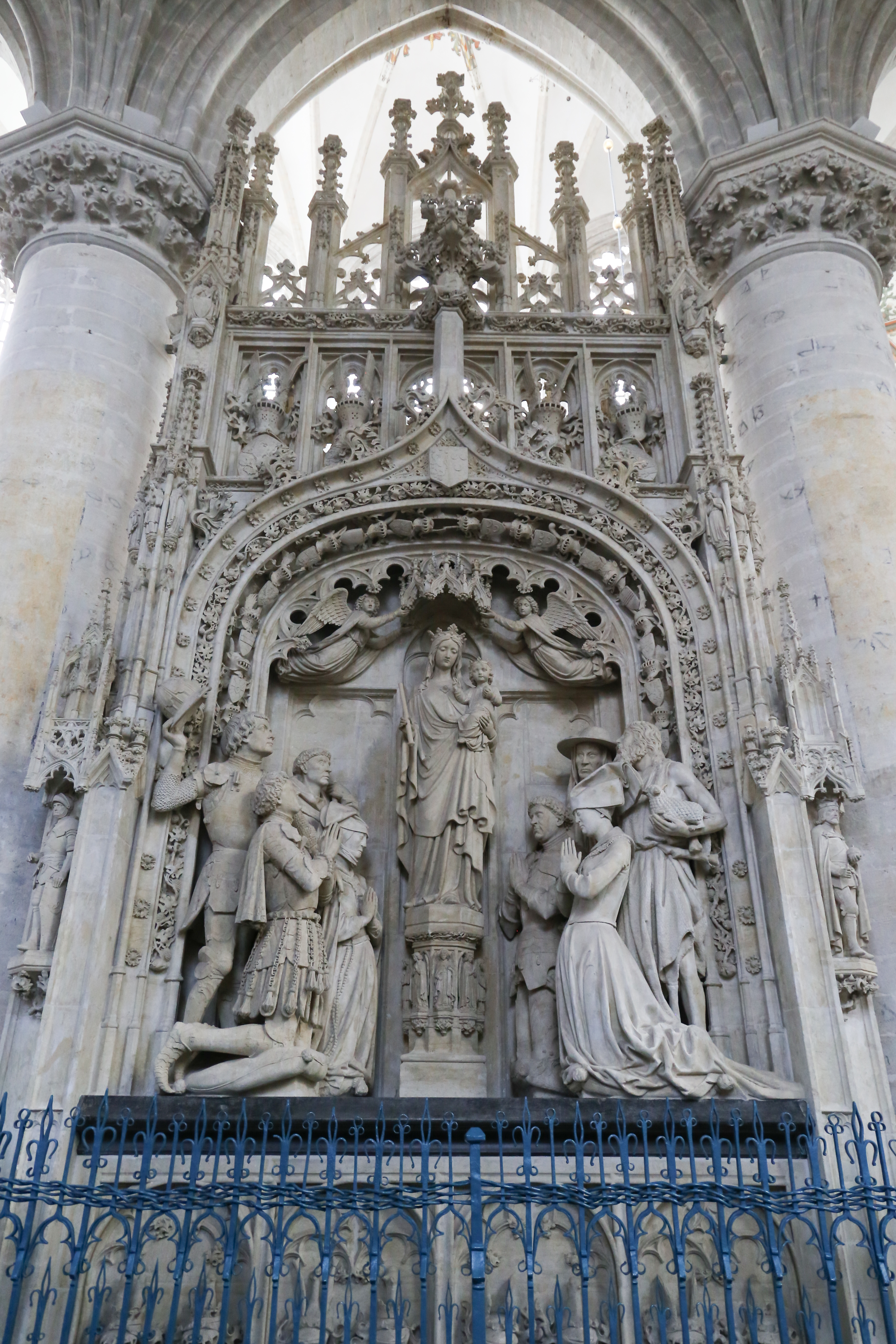 Interieur Grote of Onze-Lieve-Vrouwekerk in Breda